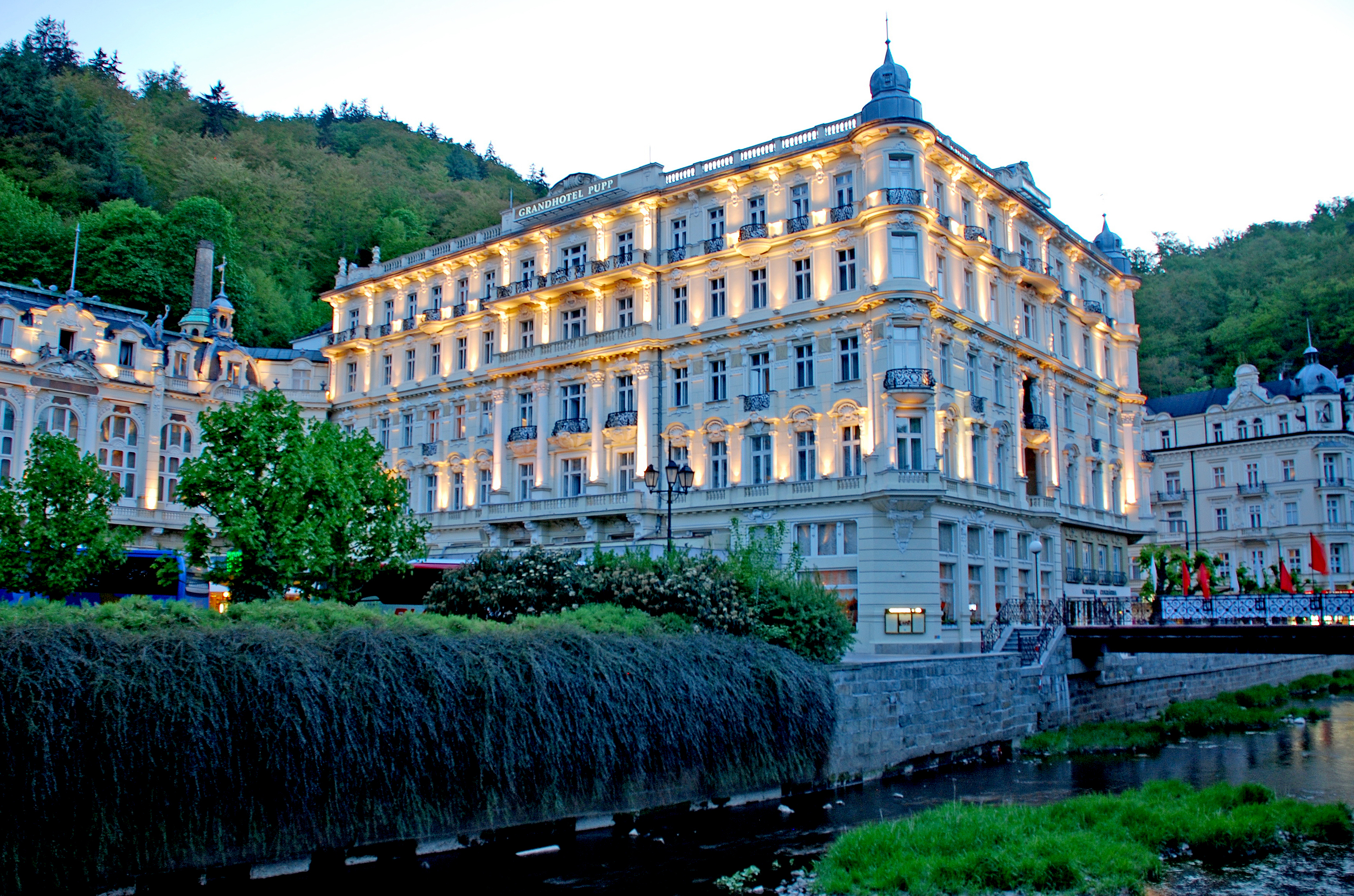 Карловы Вары